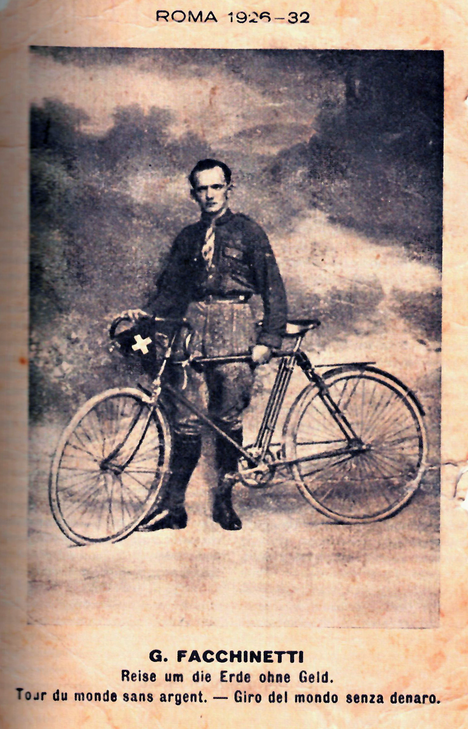 L'esploratore svizzero Giacomo Facchinetti in una cartolina d'epoca.